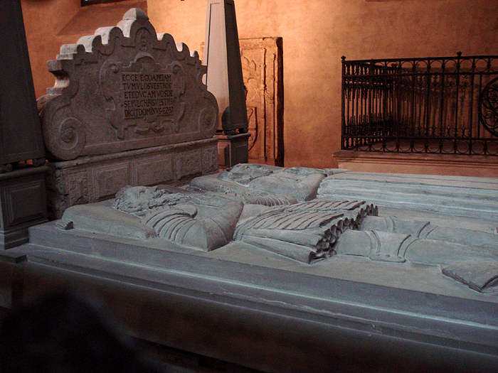 Evert Karlsson Horns grav i Åbo domkyrka